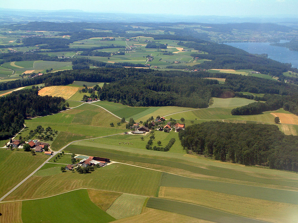 Aufnahme des Seerückens mit Hochplateau im Vordergrund